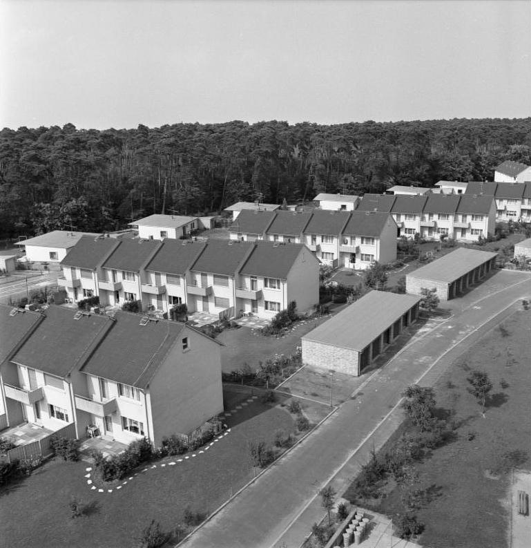 Wohnungsbau: Sprendlingen/Hessen/Kurt-Schumacher-Ring 17. - 20. Juli 1961